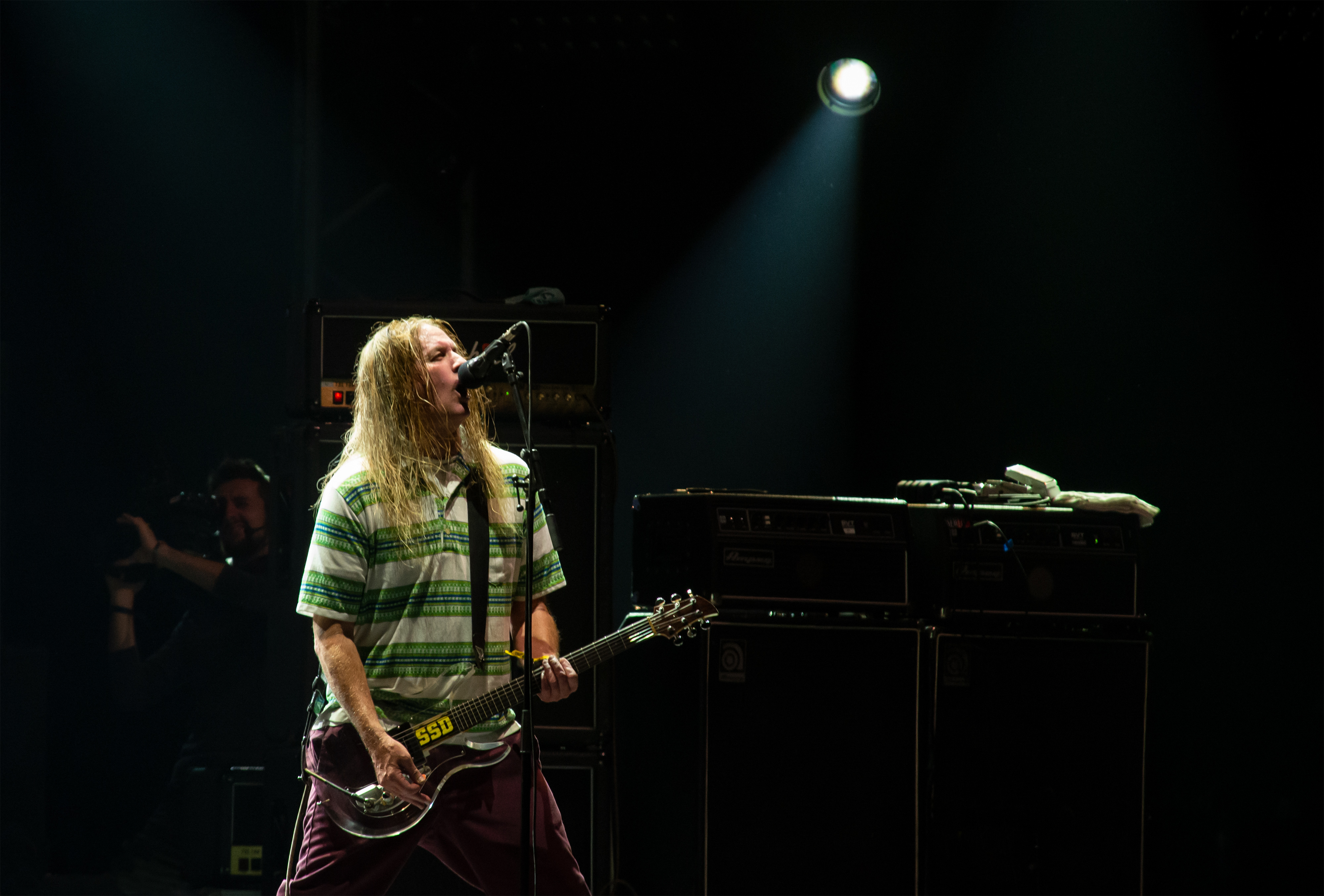 Concert de Fu Manchu au Hellfest 2019, Clisson, France.